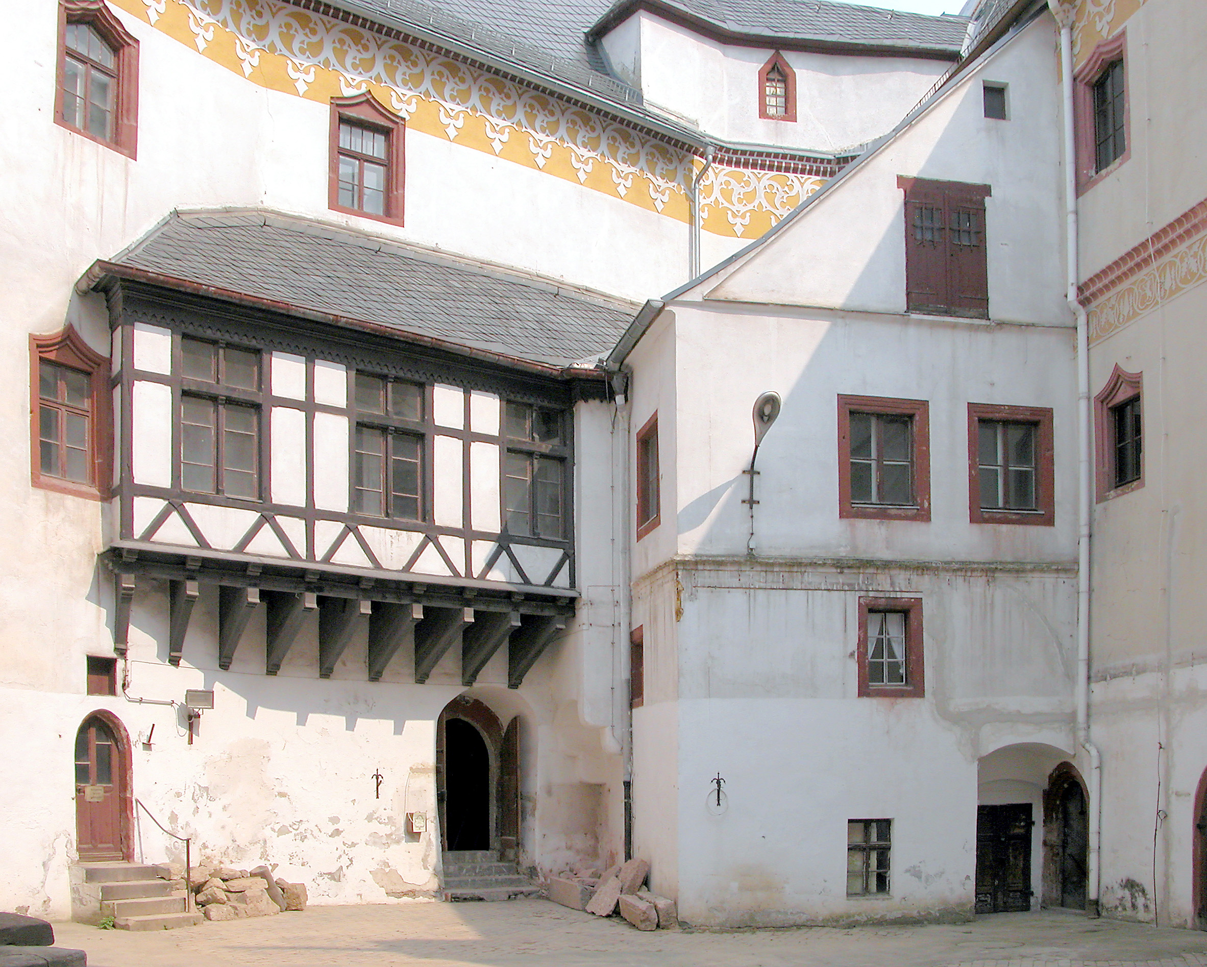 06.05.2006 09669 Sachsenburg (Frankenberg) Am Schloß 1 (GMP: 50.932797,13.029747): Schloß Sachsenburg (erste Nennung 1289). Heutiger Bau aus der Spätgotik Ende des 15. Jh. unter Caspar von Schönberg. Blick zum Nordflügel mit dem Eingang. [DSCN9911.TIF]20060506180DR.JPG(c)Blobelt